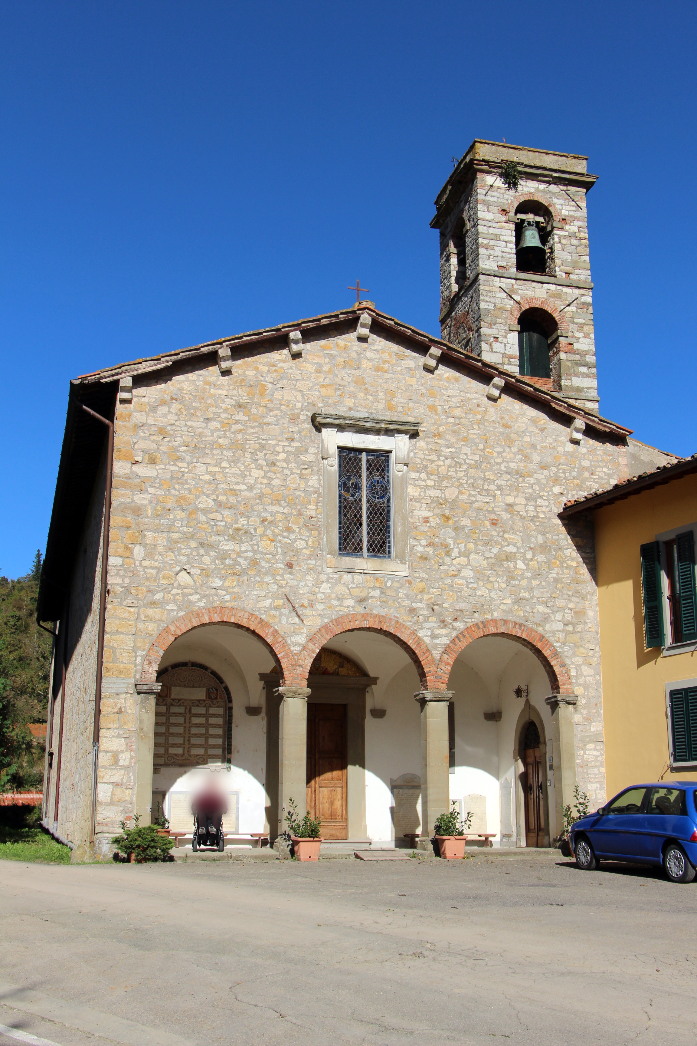 Vaglia (FI)